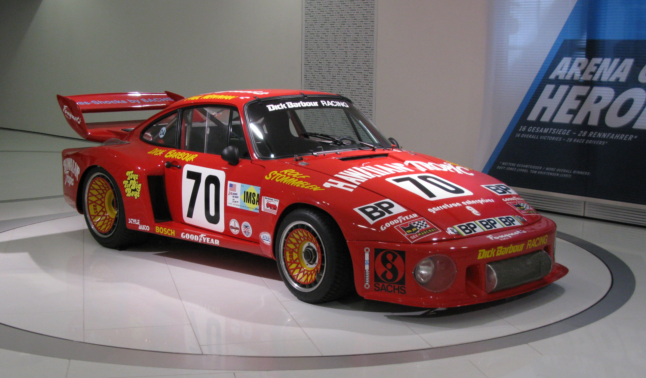 Porsche 935/77